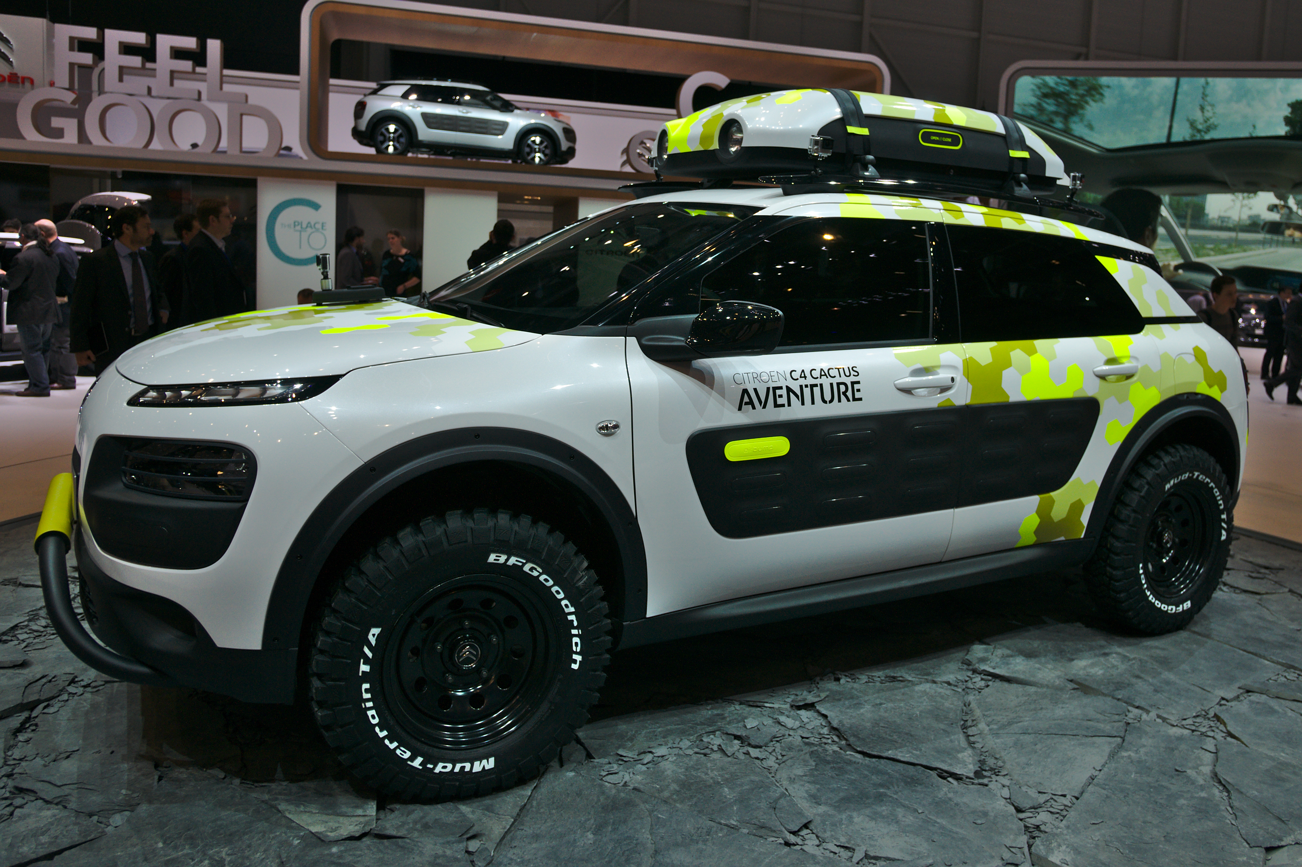 Salon de l'auto de Genève 2014 - 20140305 - Citroen